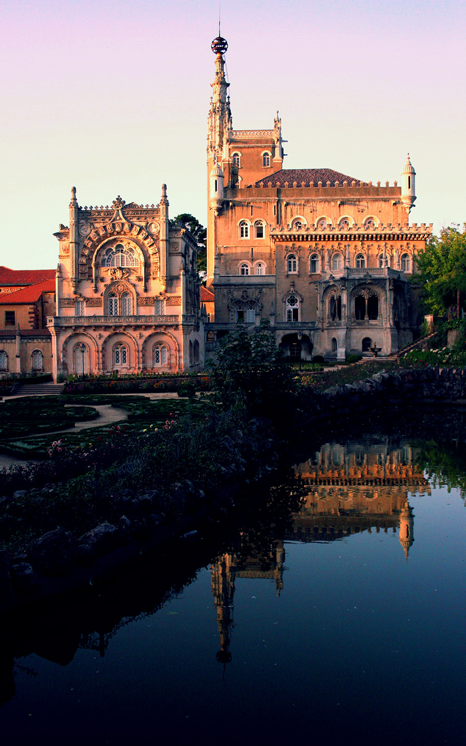 Palacio Bussaco, near Coimbra, Portugal